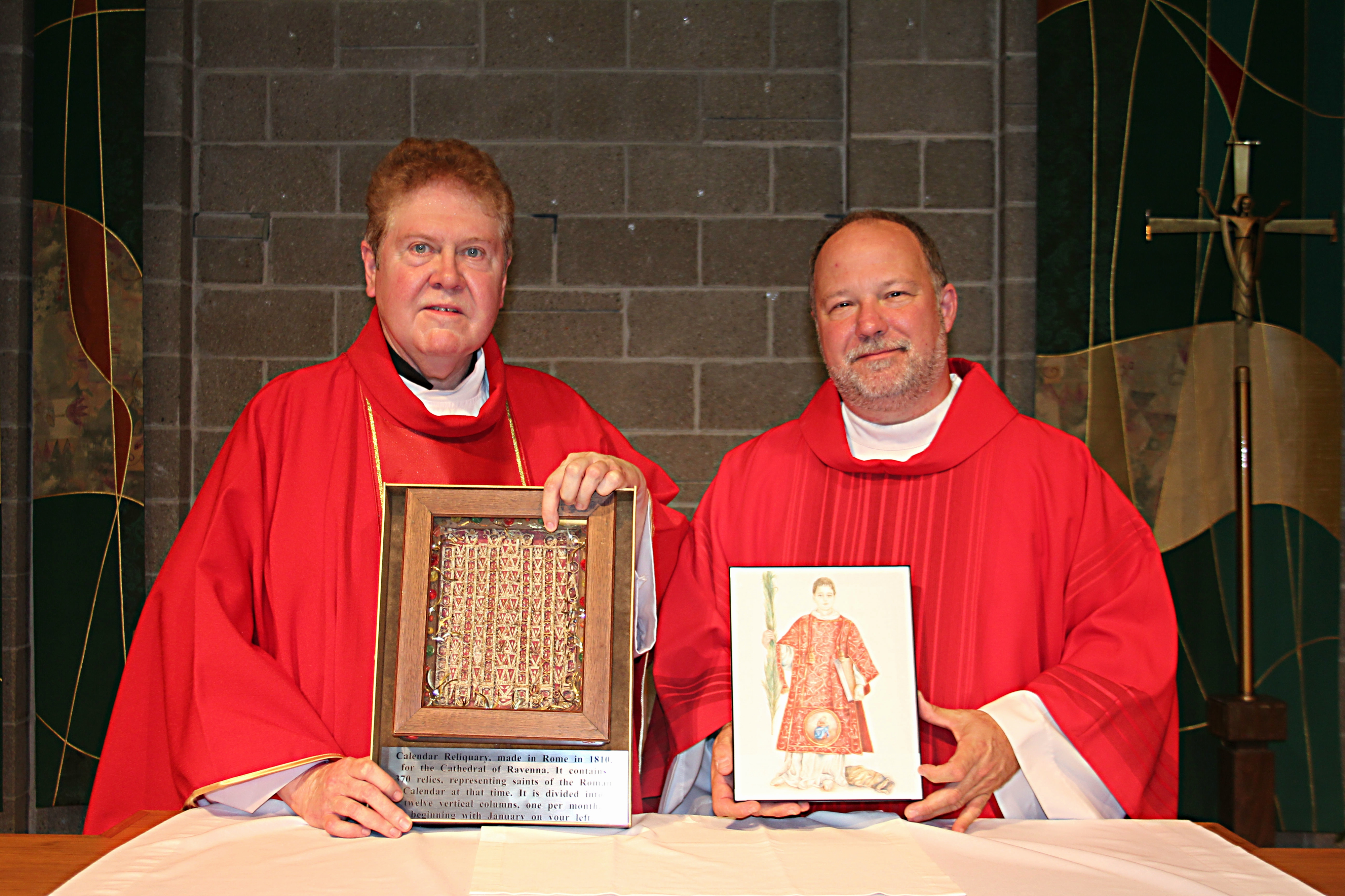 Morton Grove (Illinois), St. Martha Church: Father Dennis O'Neill ed il diacono John Herbert accanto al reliquiario-calendario, contenente un frammento osseo di San Cesario diacono e martire, e alla nuova icona del santo.